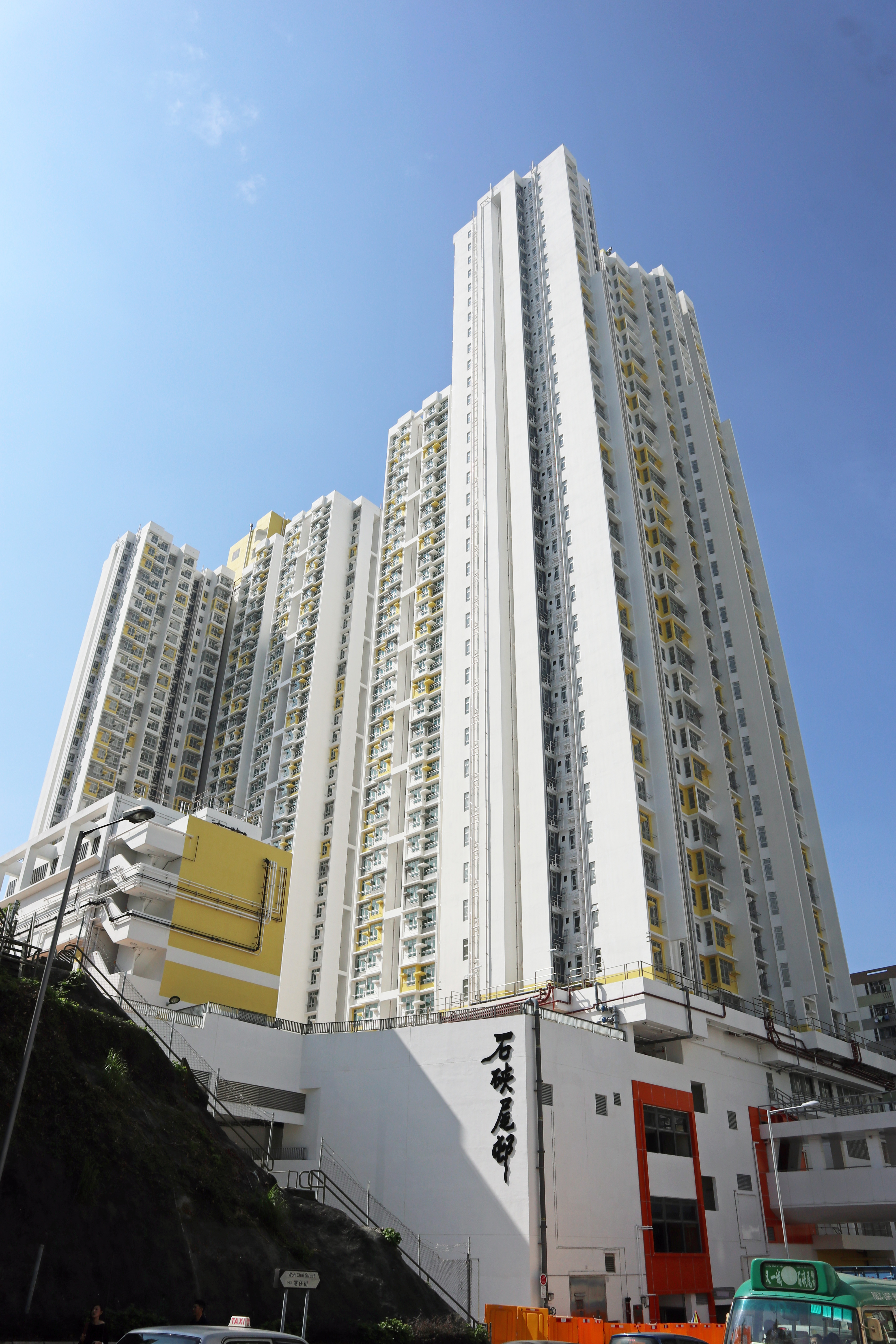 石硤尾邨美柏樓、美禧樓